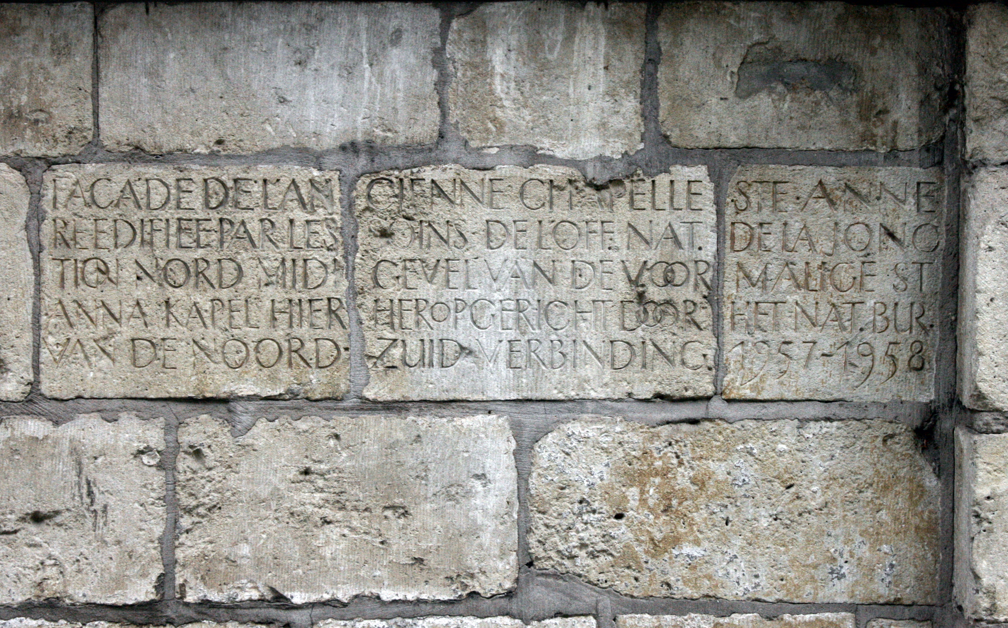 Ancienne chapelle Sainte-Anne, actuellement sacrisite de la chapelle de la Madeleine, rue de la Madeleine, Bruxelles, Belgique. Inscription jonction Nord-Midi